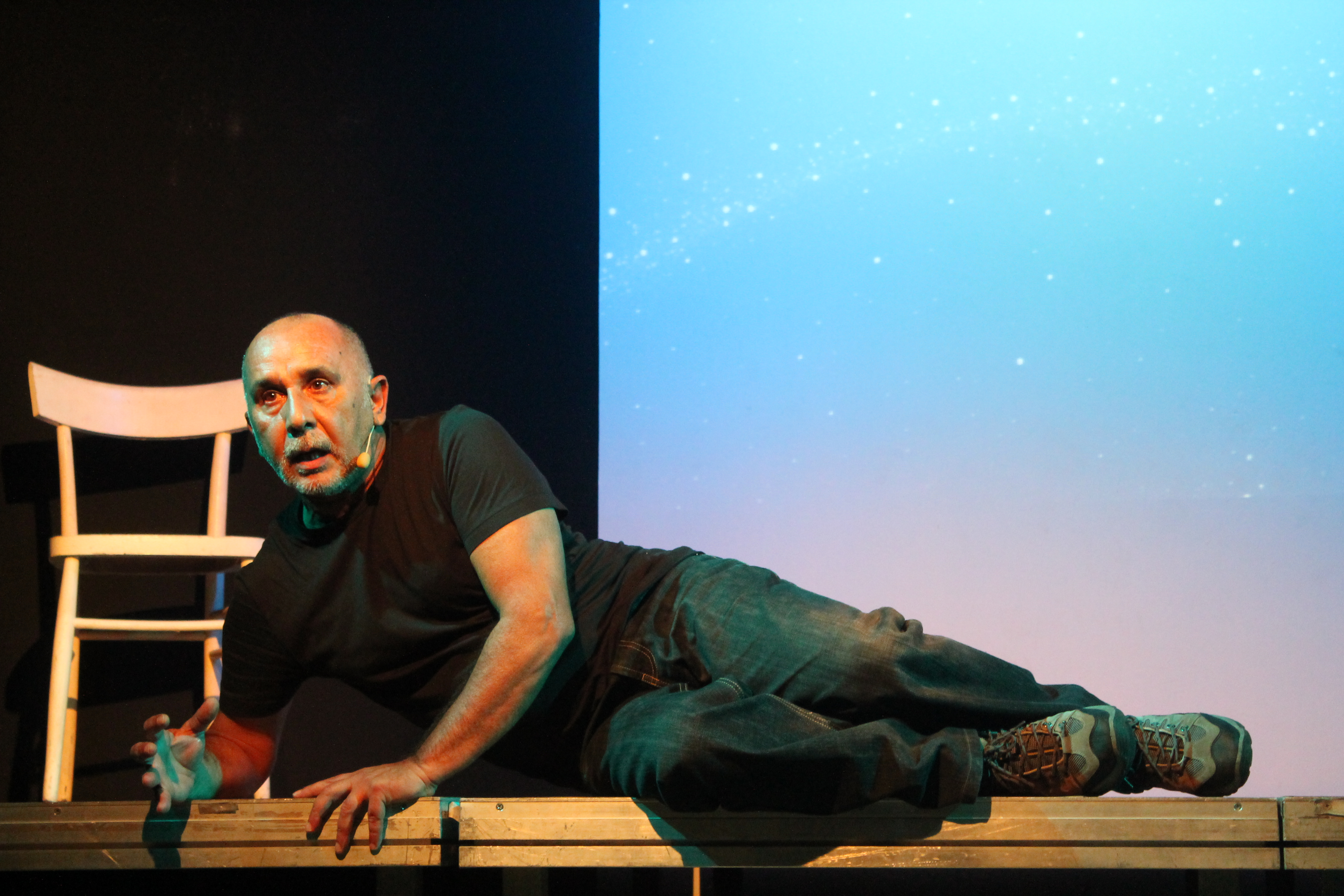 Paride Benassai durante l'esibizione della sua opera teatrale "Da Cosa Nasce Cosa" - 2015